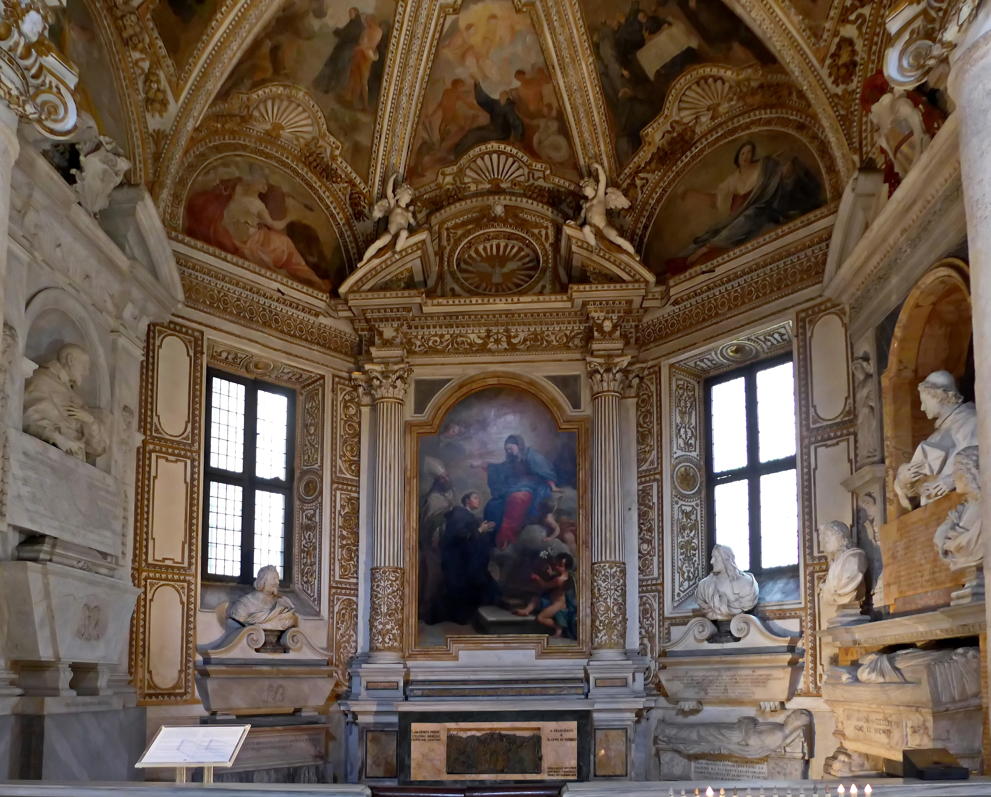 Santa Maria del Popolo Cappella Melini